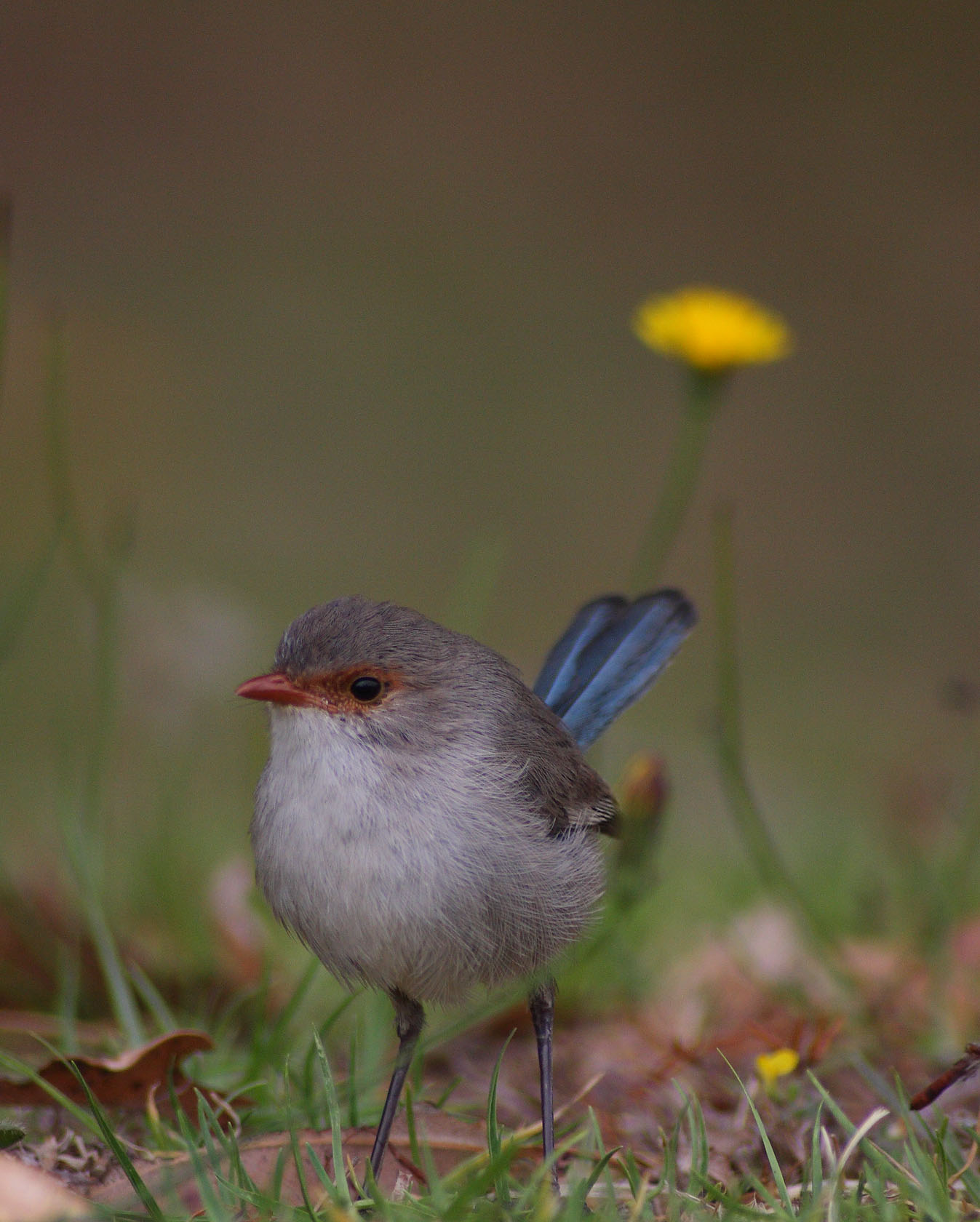 Female Malurus splendens (blue wren).